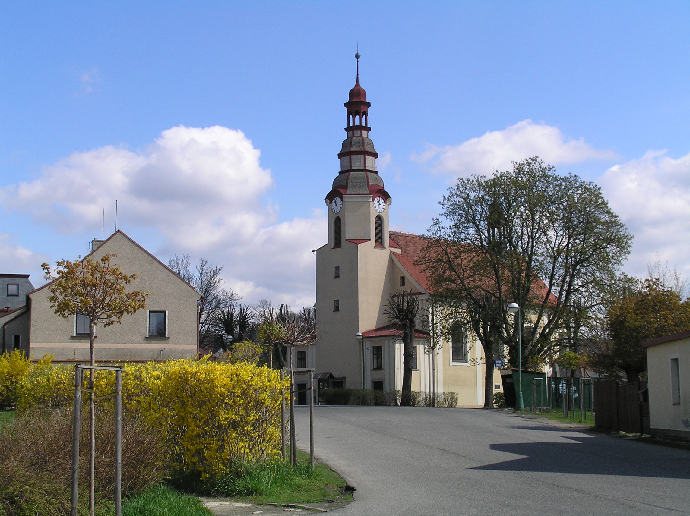 Kostel svaté Kateřiny, Stráž nad Nisou.